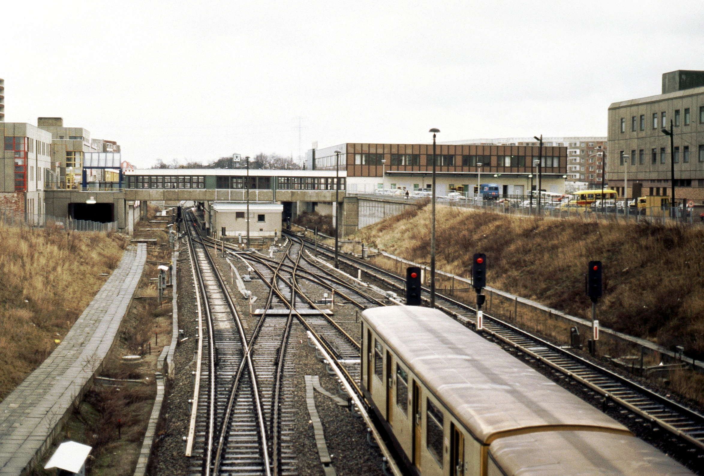 U-Bhf. Kaulsdorf-Nord, Berlin